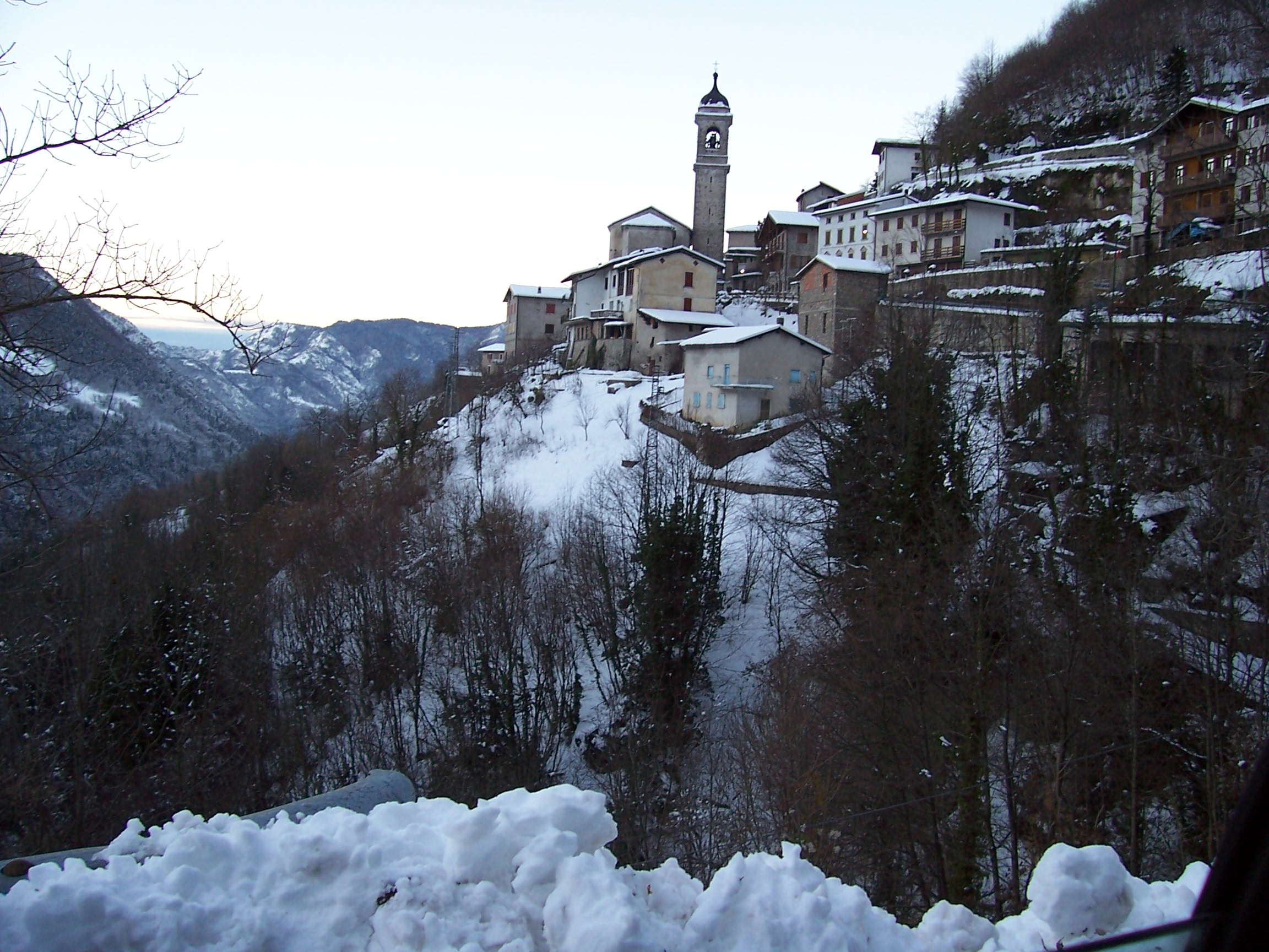 Magasa sotto la neve